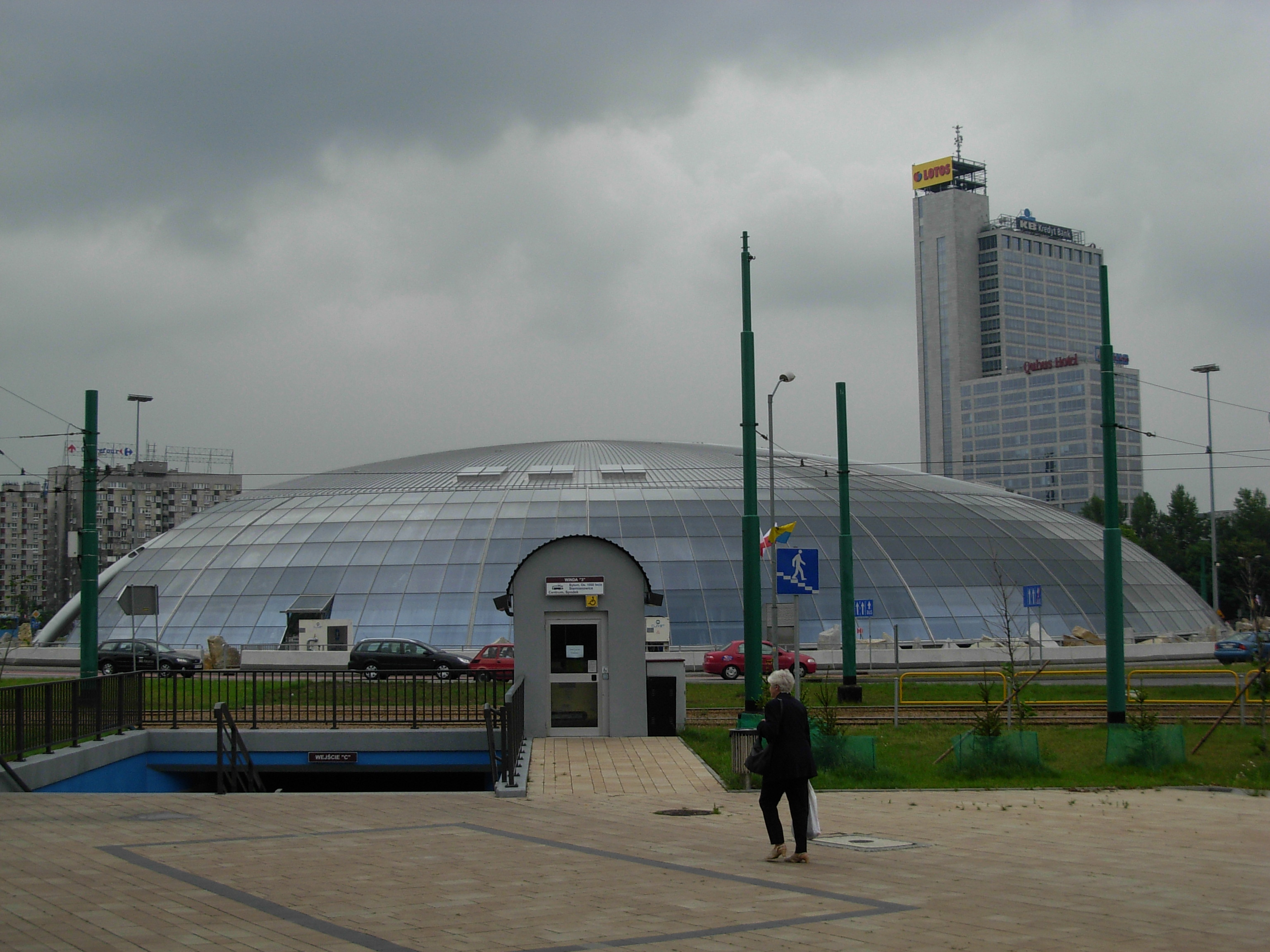 Katowice